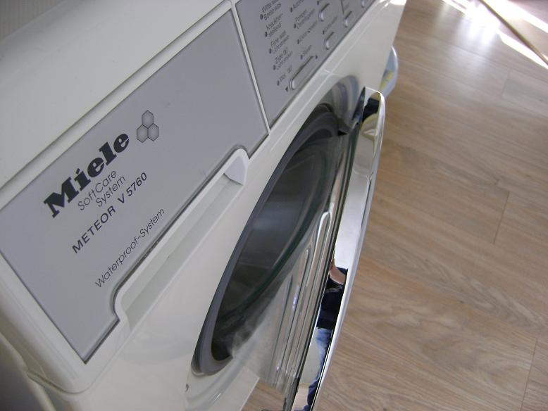 Wasmachine van Miele, vanaf de bovenkant geschoten.